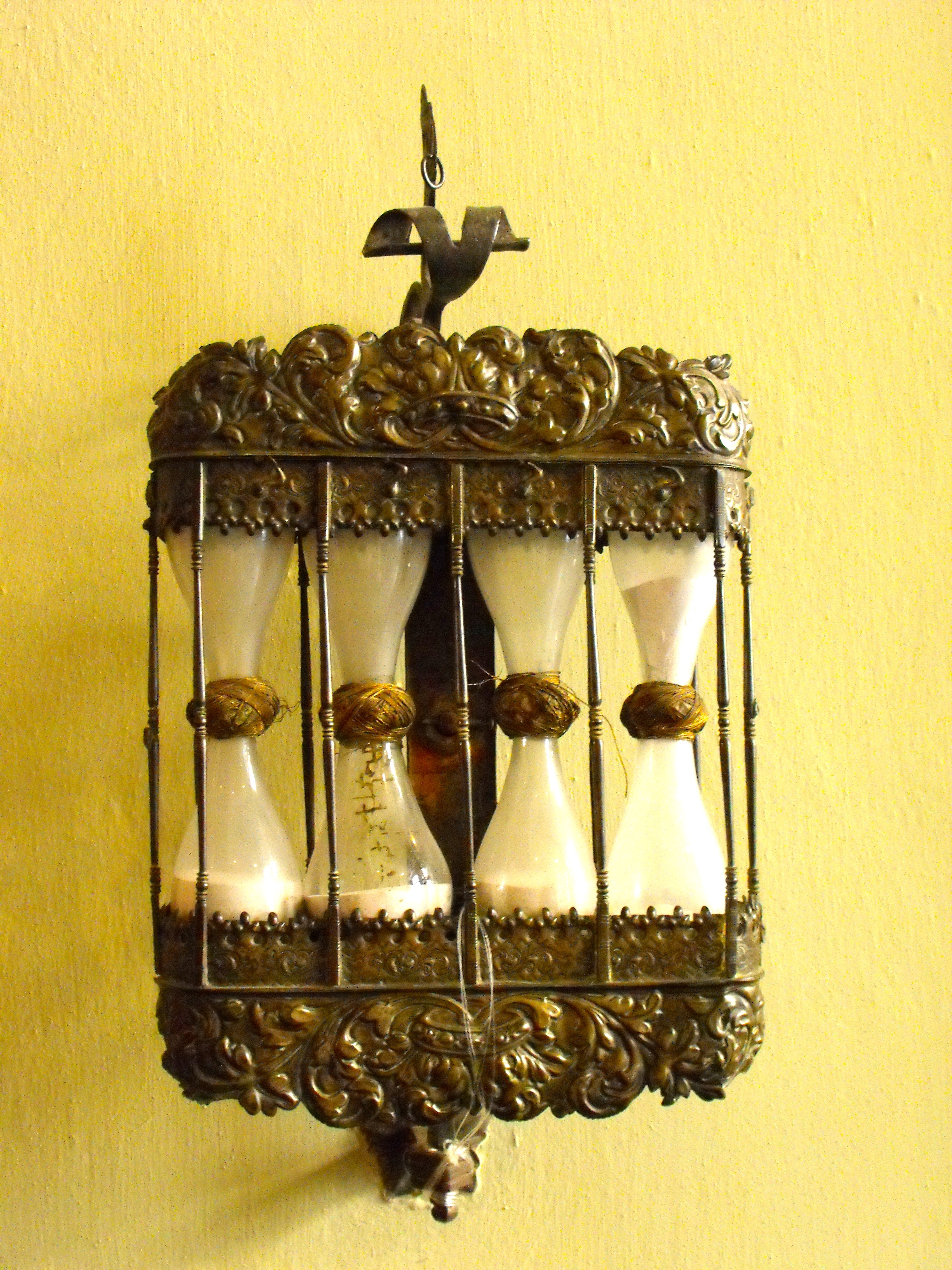 Couven-Museum: Apotheke (Sanduhr)